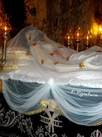 Particolare della statua di Gesù Morto della Processione dei Sacri Misteri